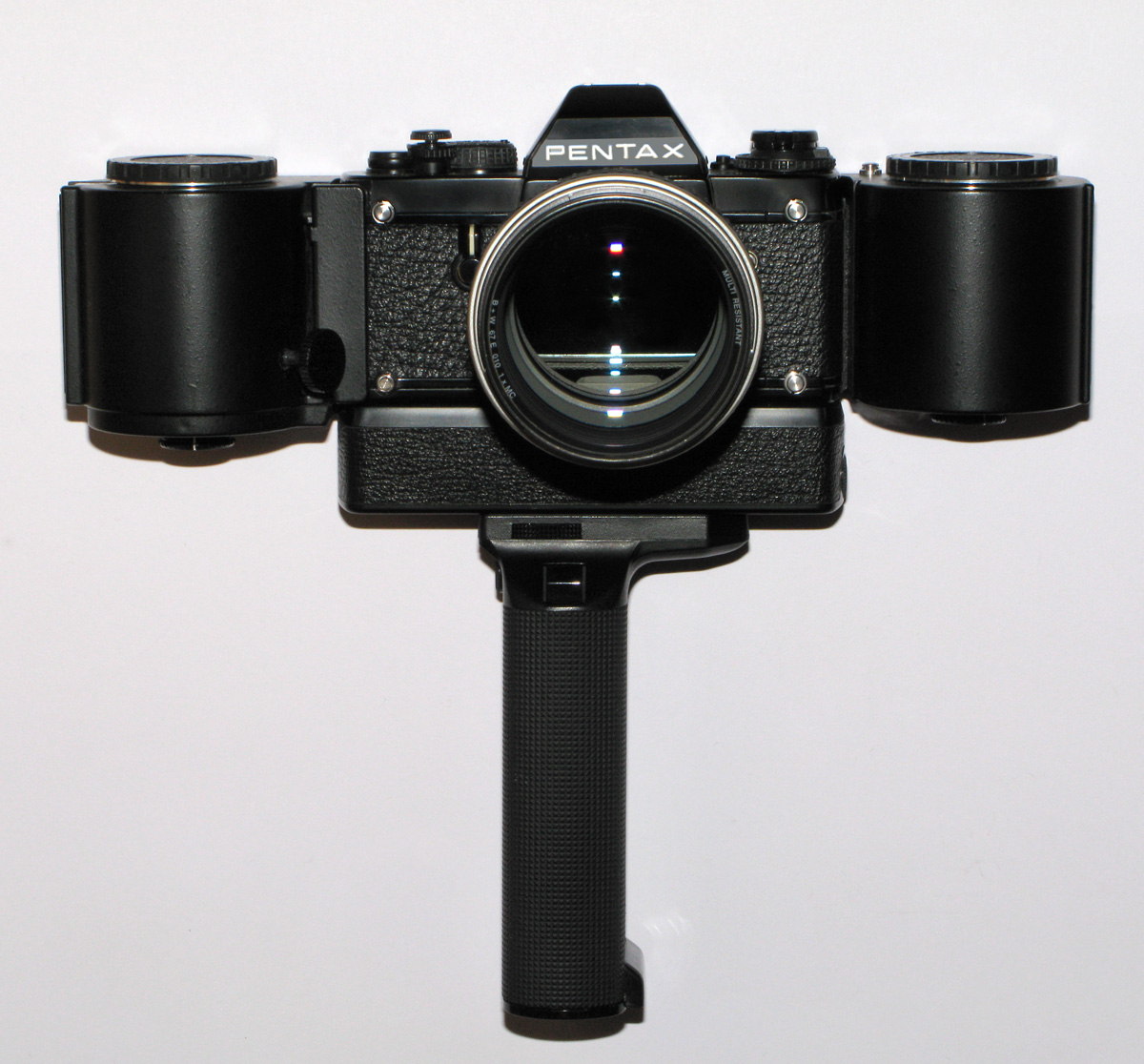 Pentax LX mit Motor Drive LX, Batteriegriff M, Langfilmmagazin LX, 1.4/85mm AF *